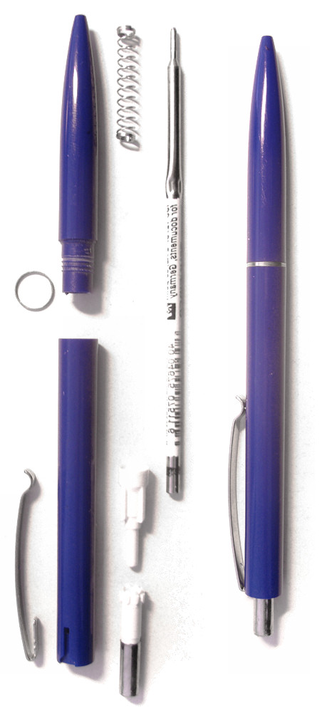 Penna a sfera, smontata (sinistra) e intera (destra).